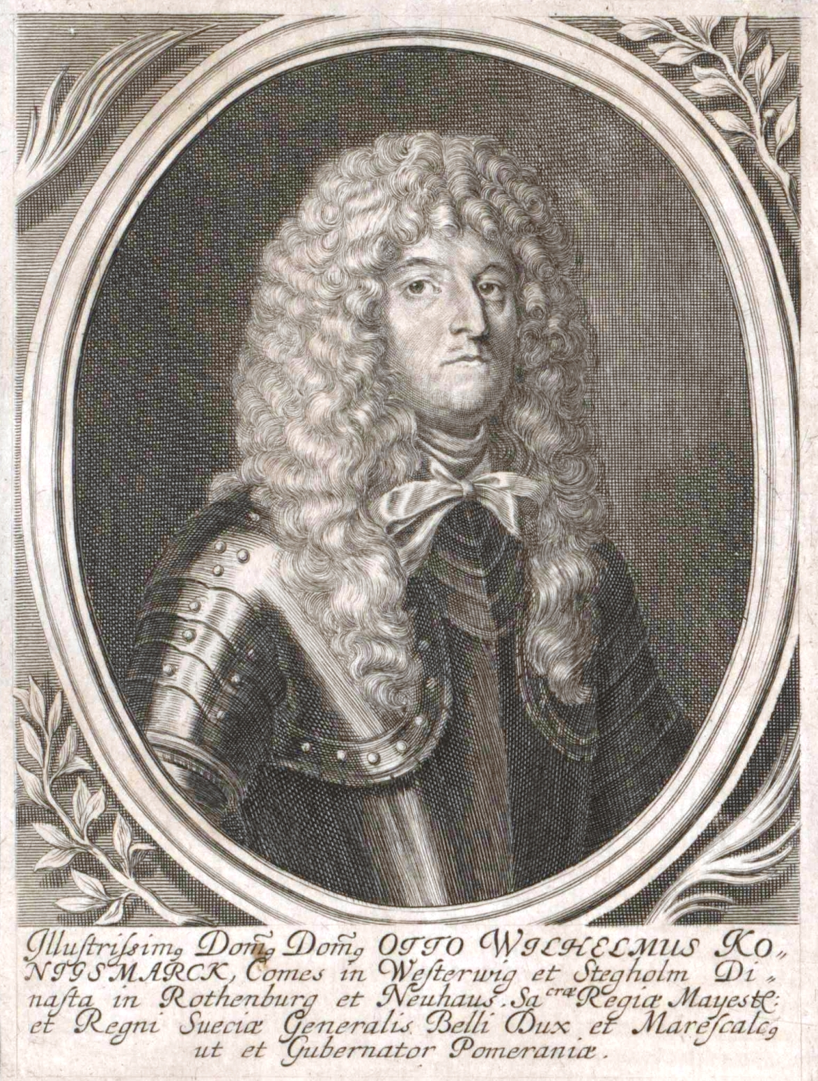 Portrait de Otto Wilhelm Königsmarck (1639-1688)